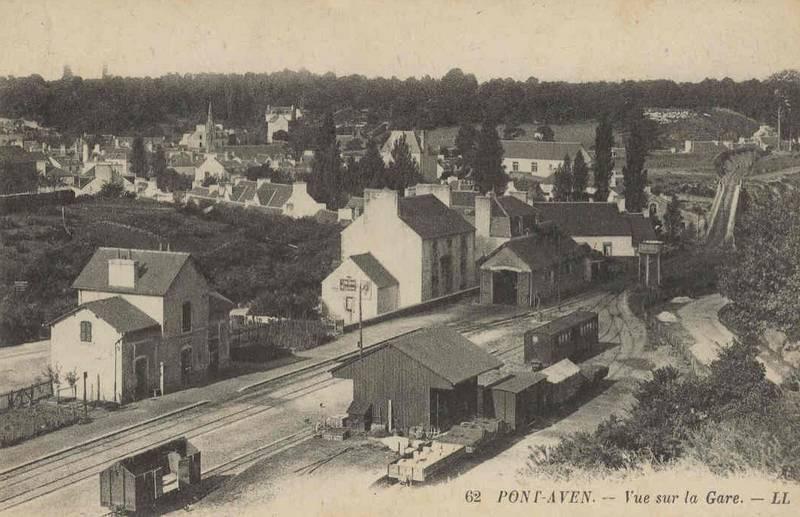 La gare de Pont-Aven (Chemins de Fer Départementaux deu Finistère)